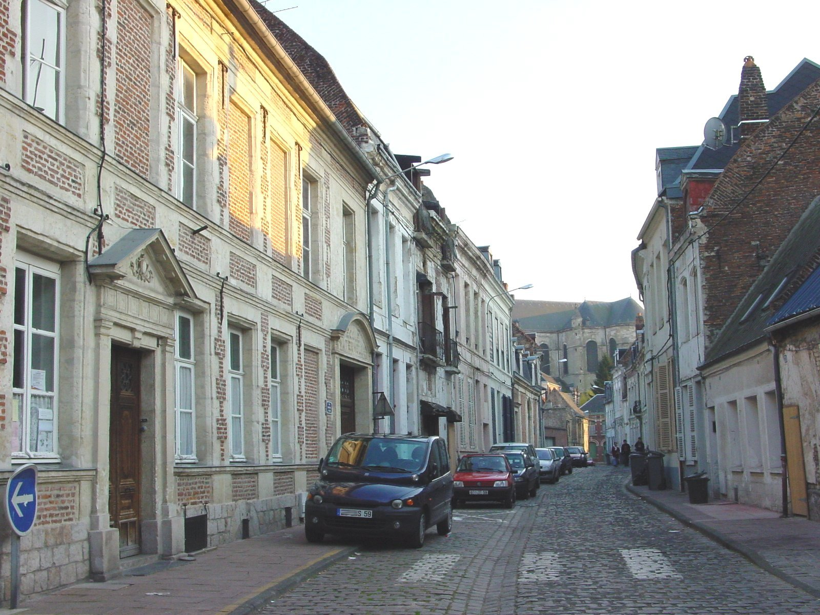 Une rue du vieux Cambrai (Rue Saint-Vaast)